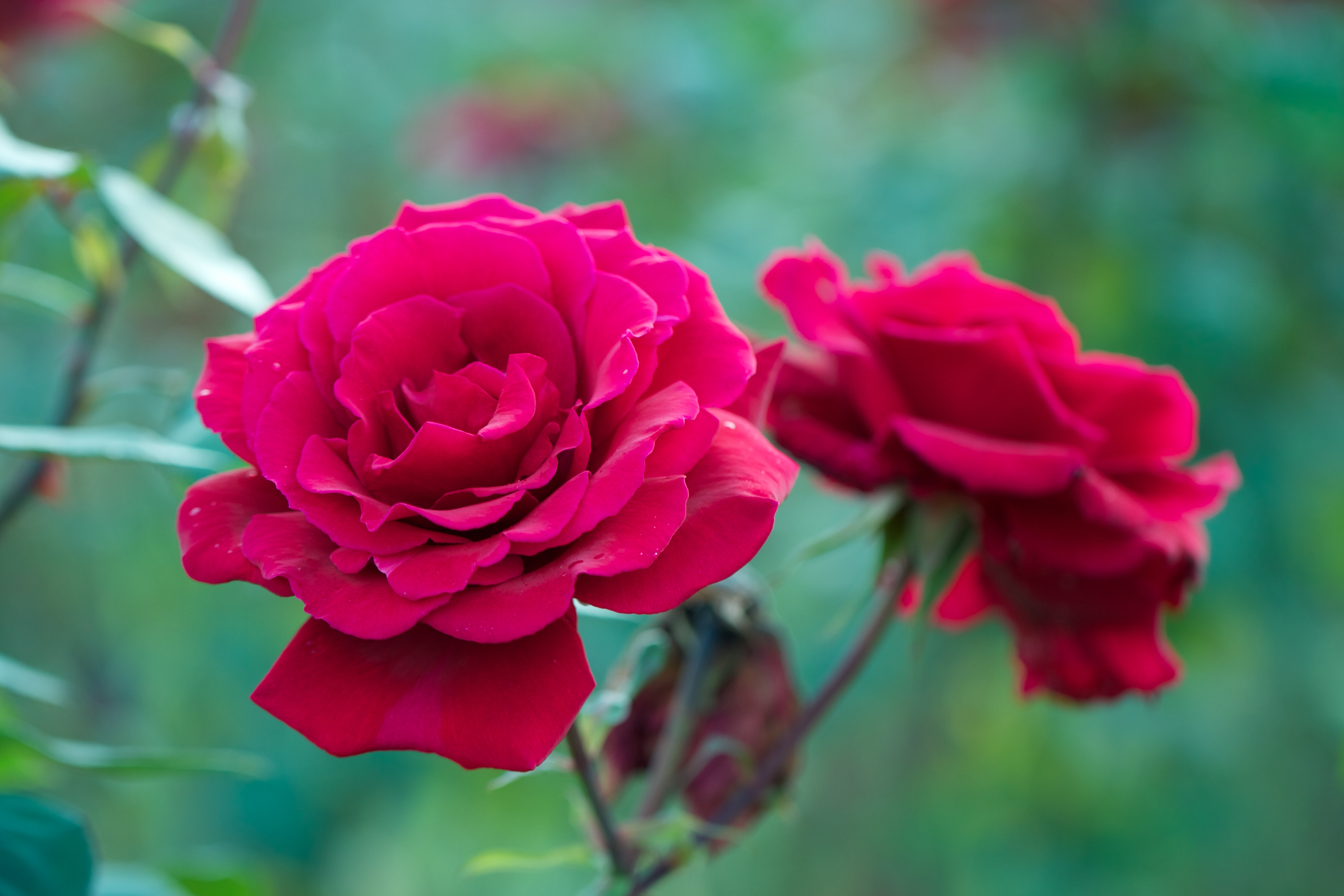 Floribunda-Rose "Nina Weibull", D.T. Poulsen, 1961